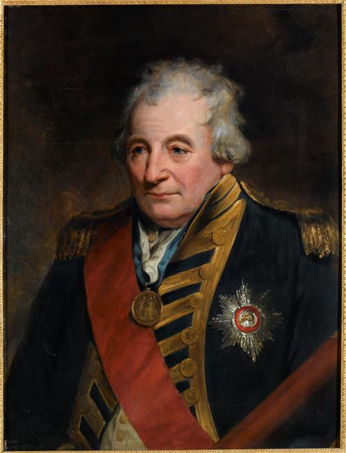 Amiral John Jervis, comte de Saint-Vincent (1735-1823)